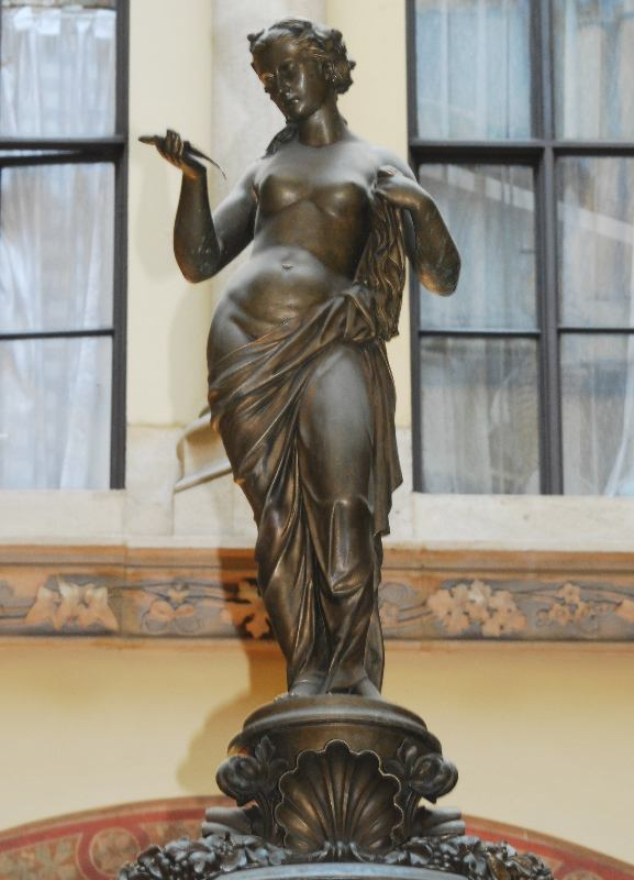 Donaunixenbrunnen im Palais Ferstel, Wien